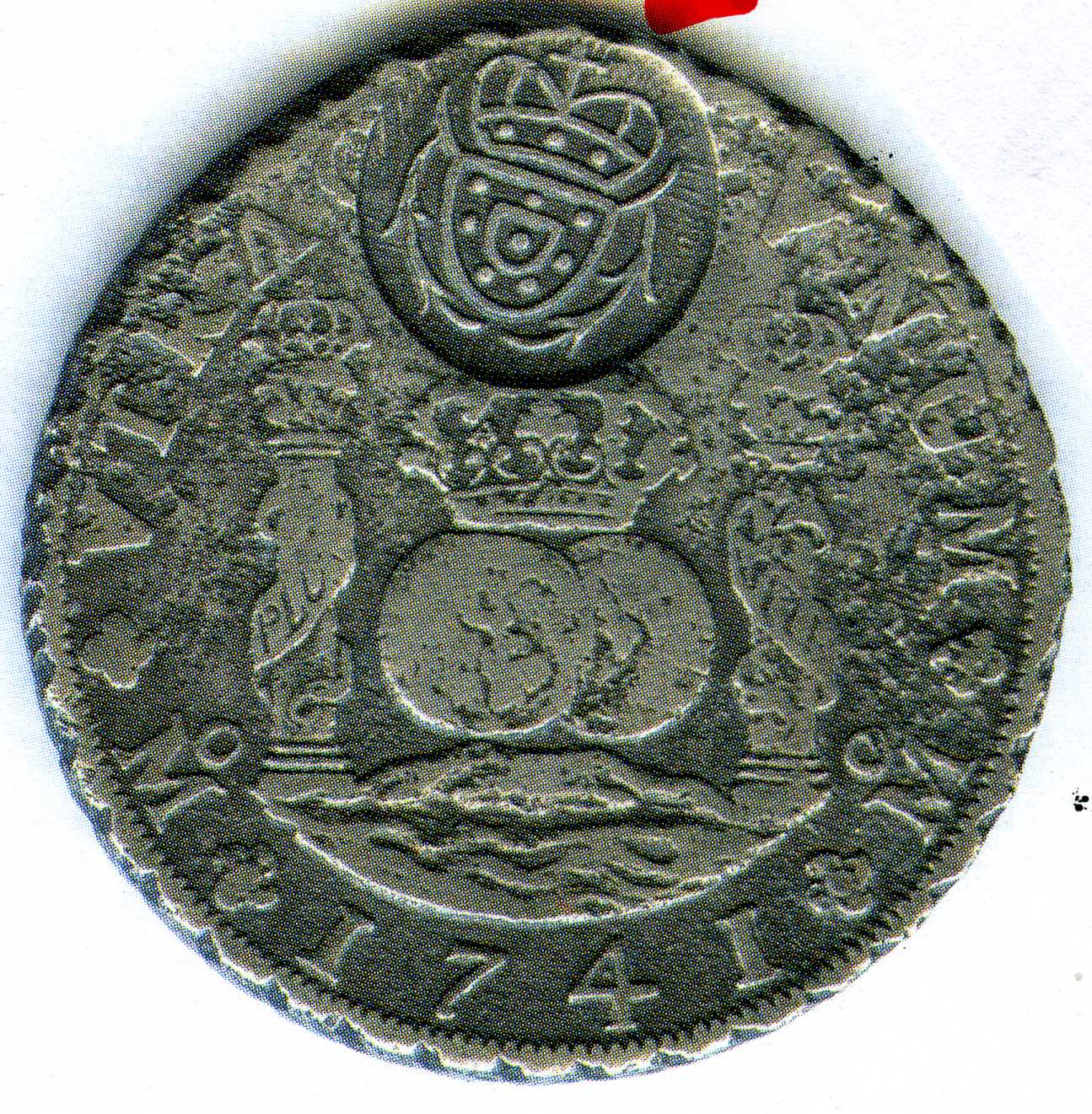 Moneda española contramarcada en las indias portuguesas